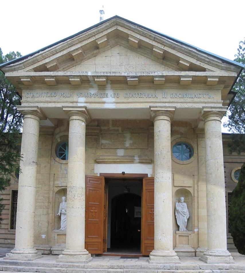 Свято-Катерининський (Спаський) собор у Херсоні, західний (центральний) фасад (серпень 2007)